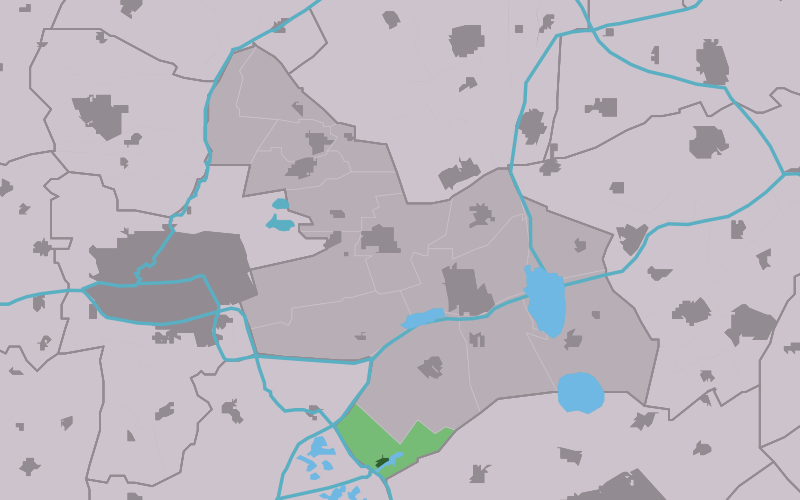 Kaartsje fan himrik fan Earnewâld